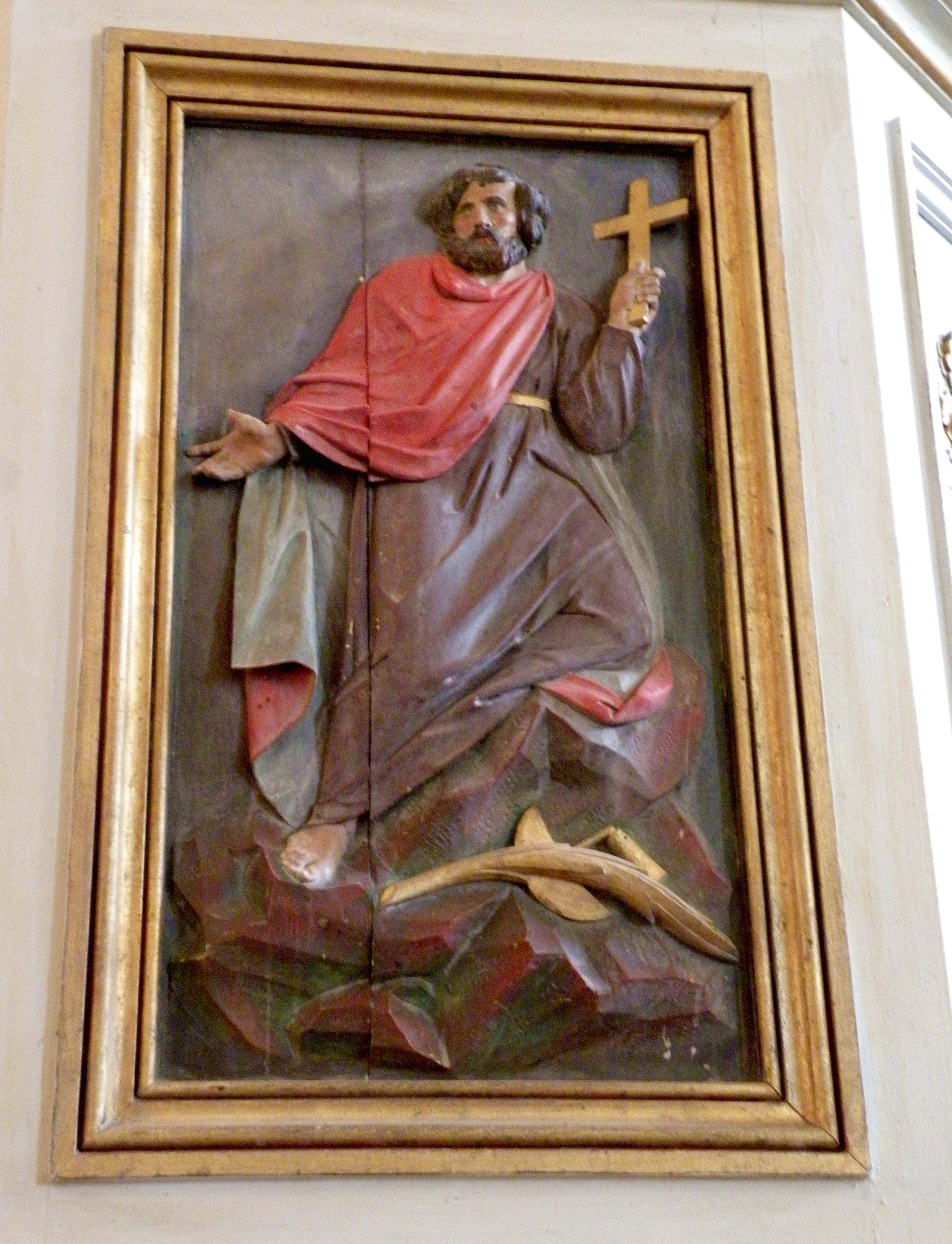 Intérieur de l'église Saint-Crépin-et-Saint-Crépinien de Saint-Crépin-Ibouvillers, chaire à prêcher, bas-relief de l'un des deux saints patrons.